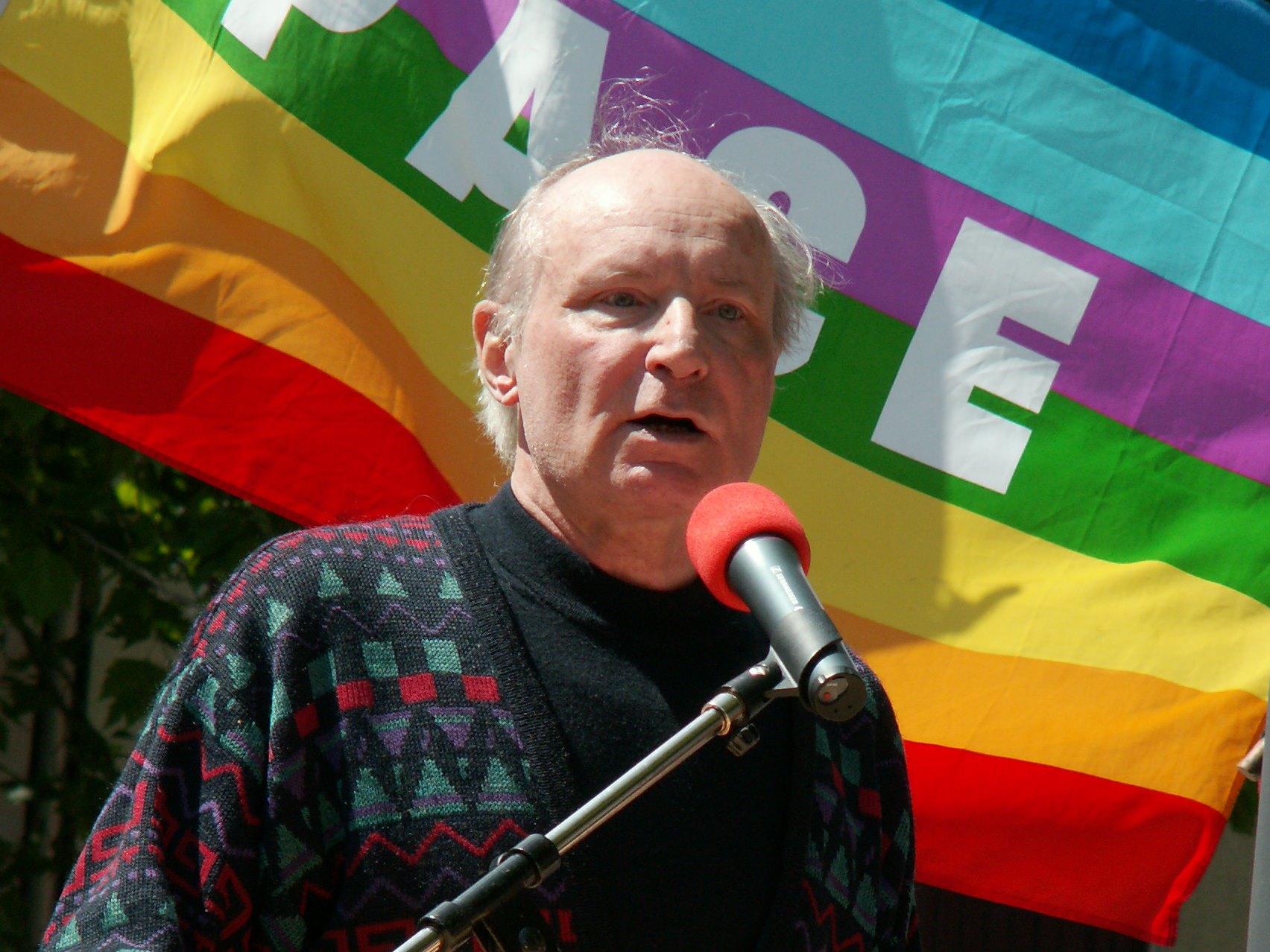 Eugen Drewermann als Abschlussredner einer Friedensdemonstration am 23. Mai 2009 während des 32. Evangelischen Kirchentages in Bremen.